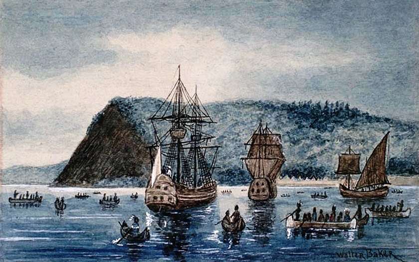 L'arrivée de Jacques Cartier dans le village iroquoien de Stadaconé en 1535